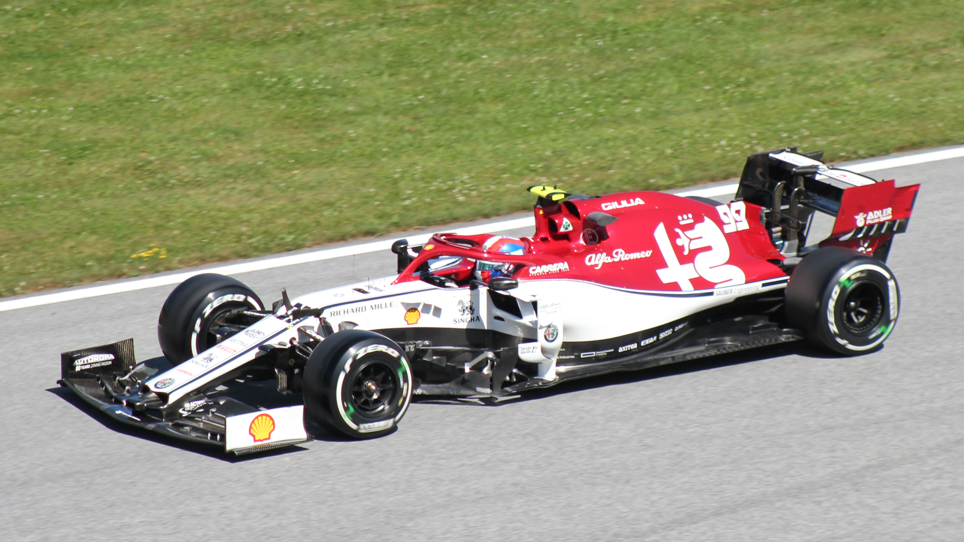 Giovinazzi beim Rennwochenende in Österreich 2019